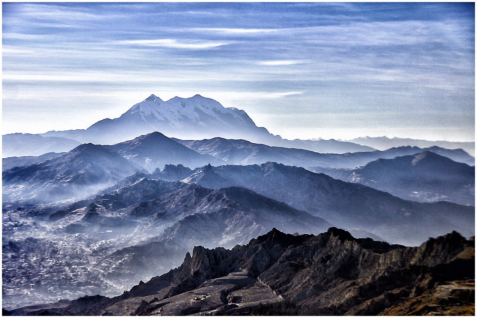 Vista panorámica de la zona Sur de la ciudad de La Paz, temprano en la mañana.